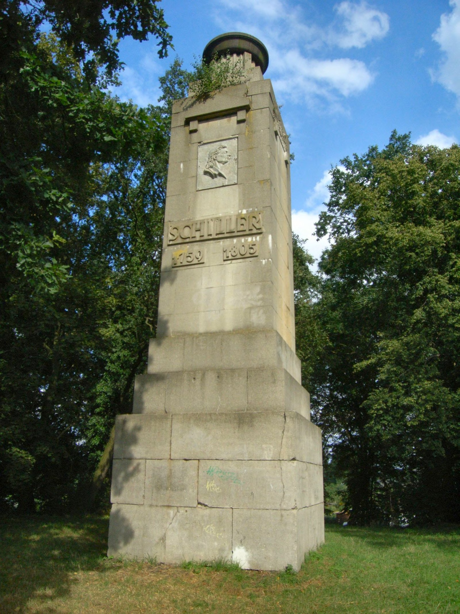 Dessau, Schillerdenkmal, früher Bismarckturm (am 1. April 1905 eingeweiht), 1955 zum Schillerdenkmal umgewidemt, Schiller-Relief aus Sandstein von Bildhauer Propf aus Köthen